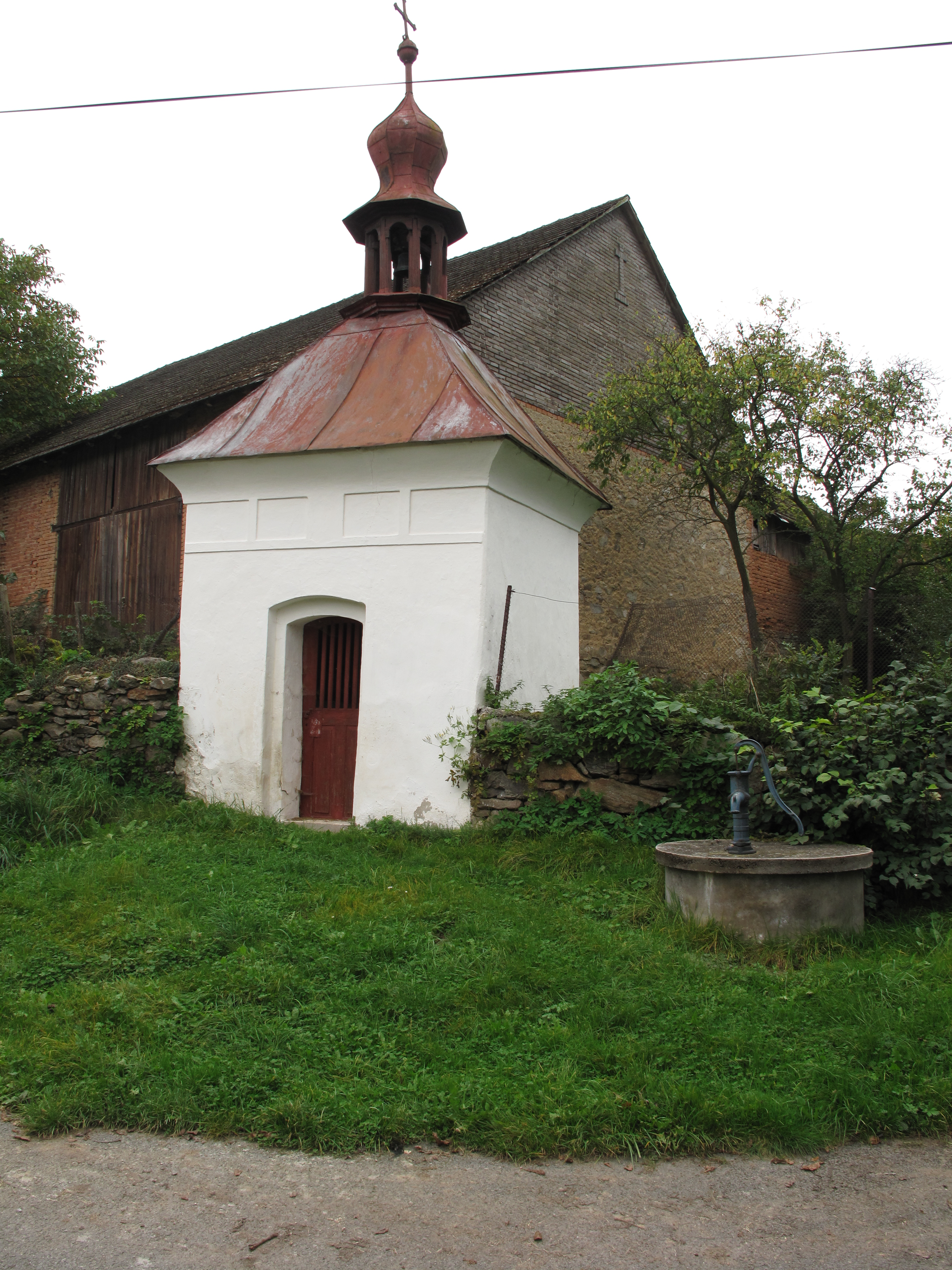 Kaplička ve Skrýšově. Okres Benešov, Česká republika.